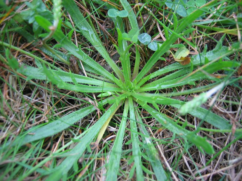 Krähenfuß-Wegereich Plantago coronopus, Wismarbucht